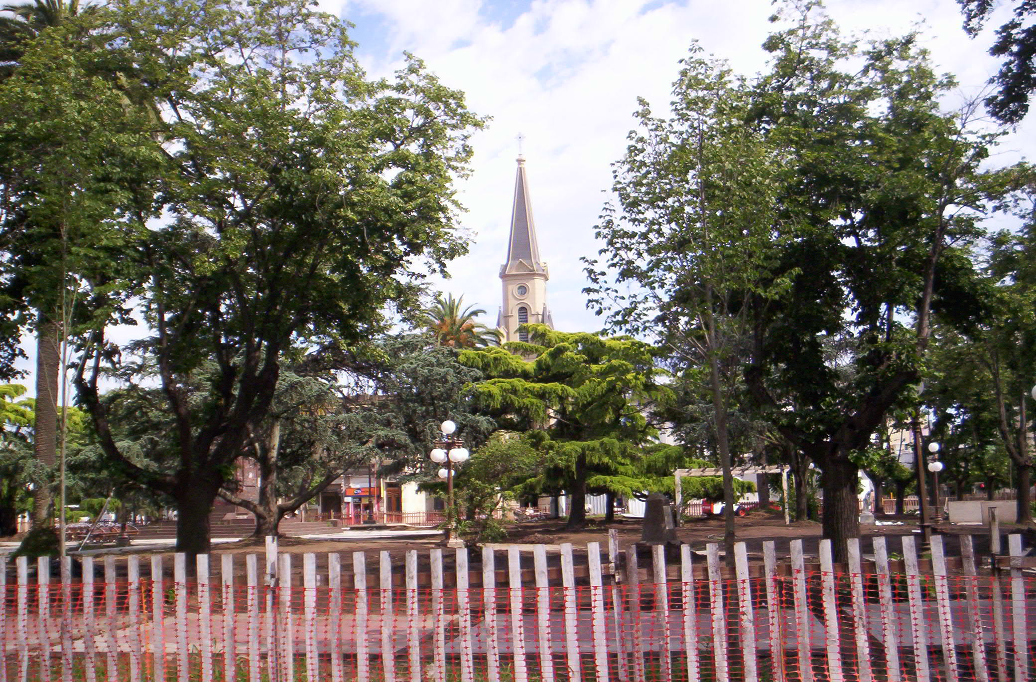 Obras de remodelación de la plaza 25 de mayo de Junín, Argentina.